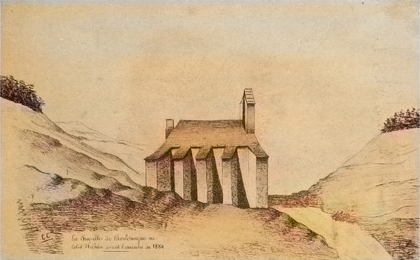 La chapelle de Charlemagne a Ibañeta, avant 1884